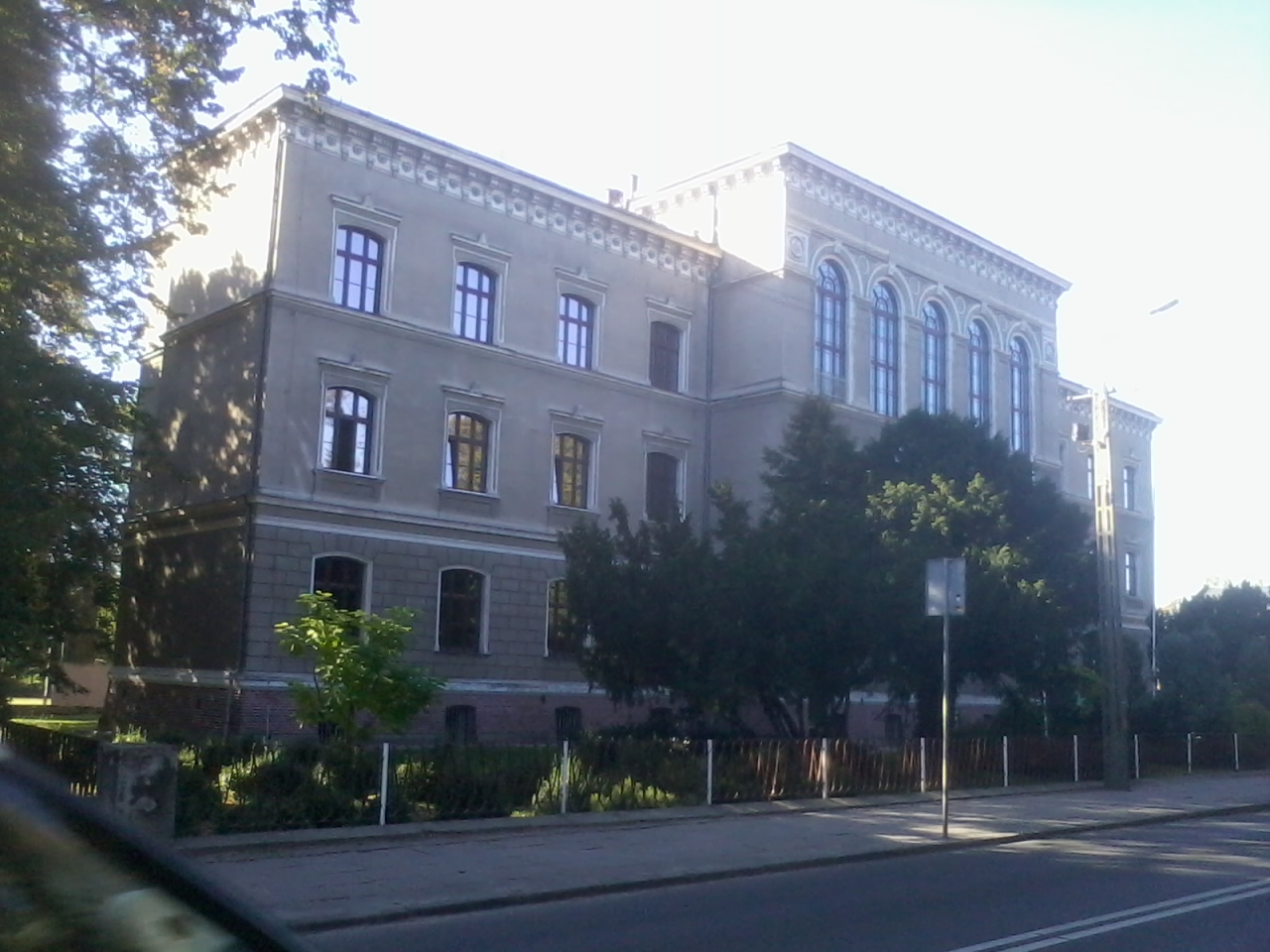 Kluczbork, szkoła, 1871-1876, Zespołu Szkół Poandgimnazjalnych, Skłodowskiej 13